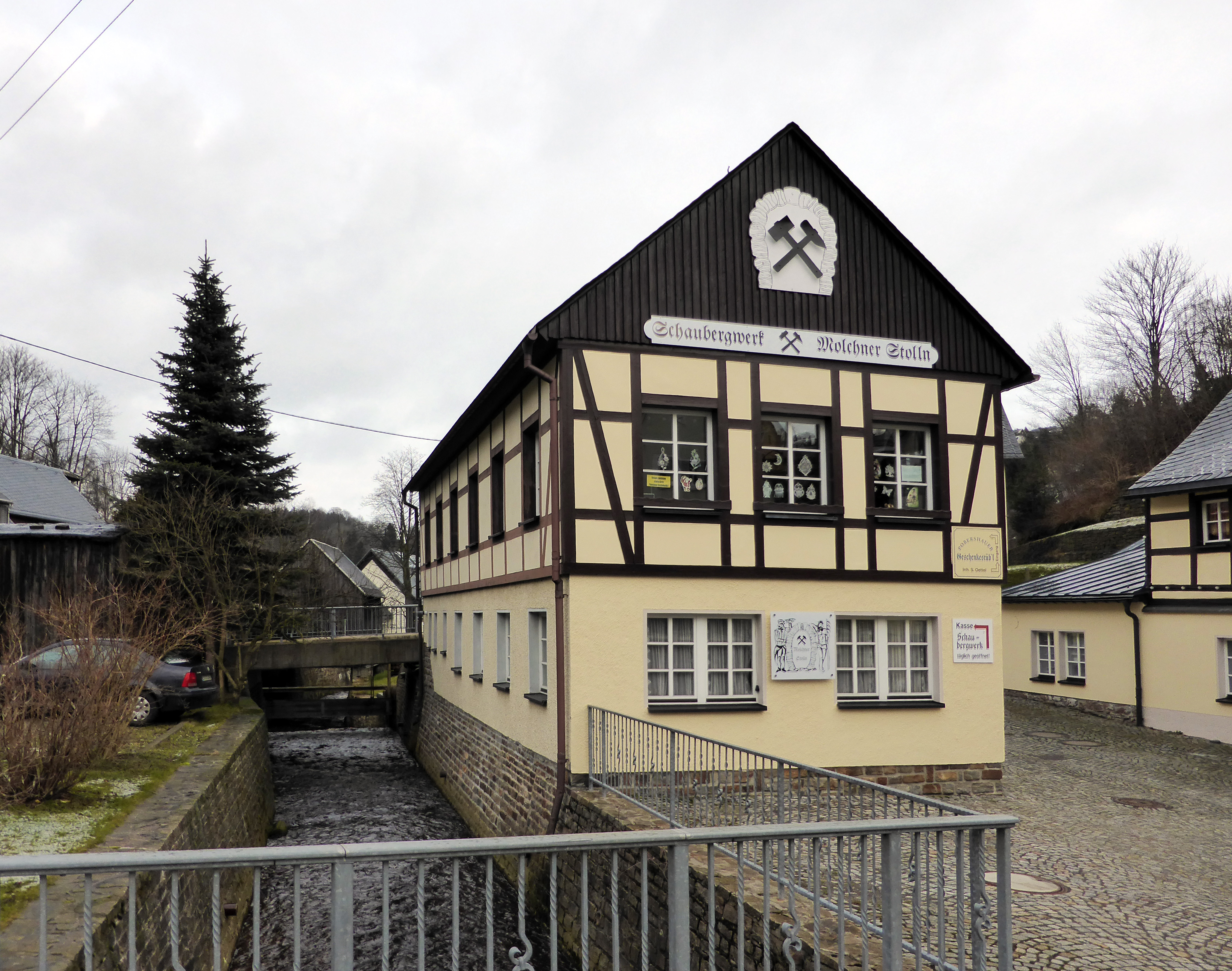 Schaubergwerk Molchner Stolln, ehem. Silber- und Zinnerzbergwerk in Pobershau, Erzgebirge - Sachsen.